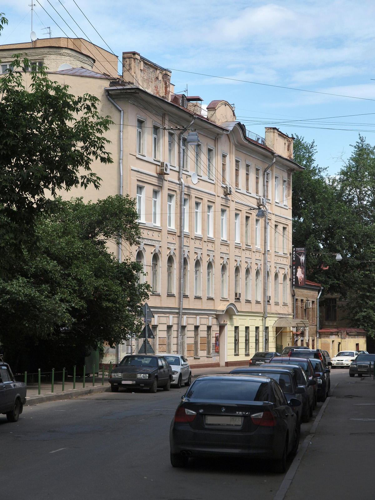 Degtyarny Lane, Moscow.